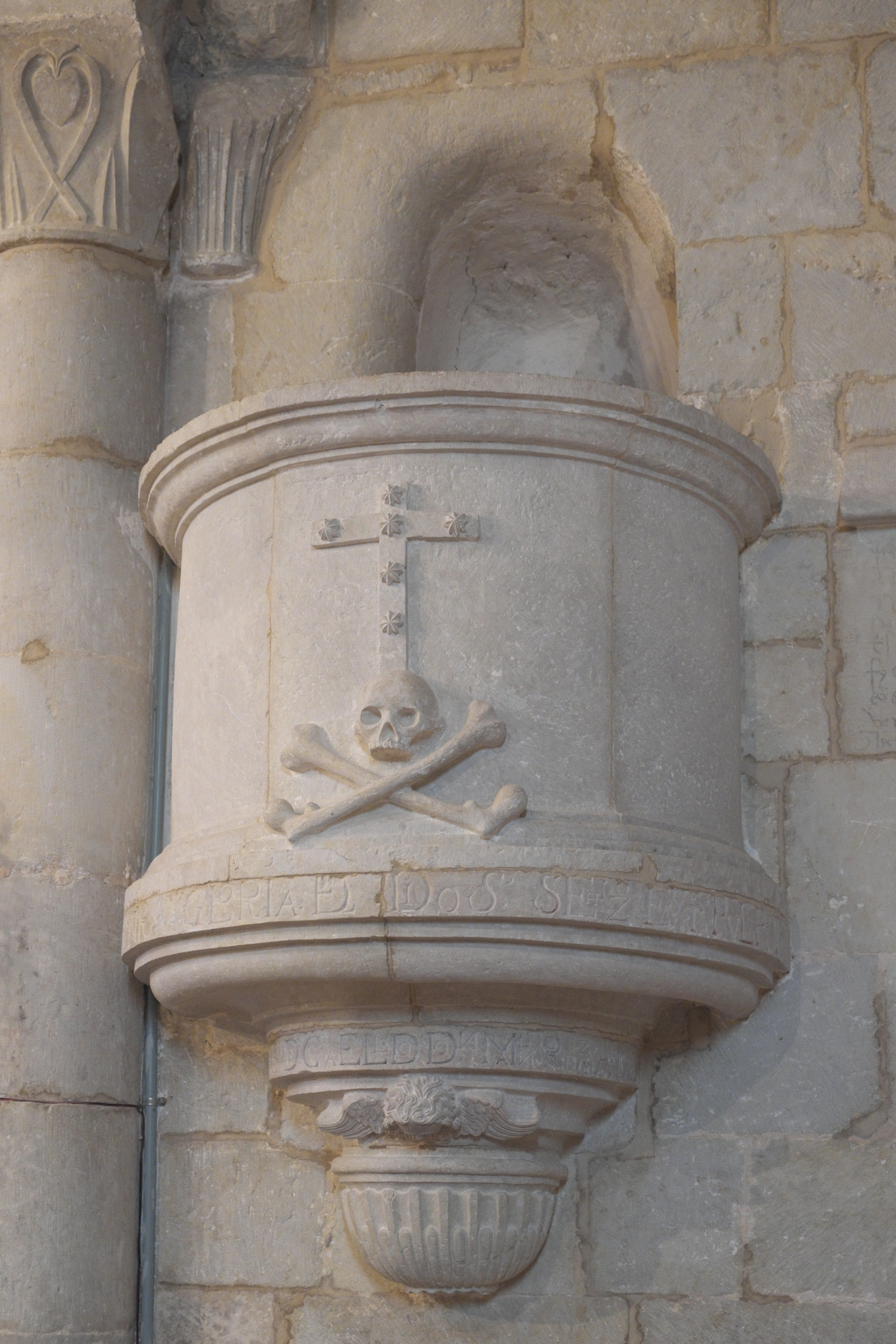 Kirche San Fructuoso Mártir in Colmenares de Ojeda (Dehesa de Montejo) in der Provinz Palencia (Kastilien-León/Spanien), Steinkanzel